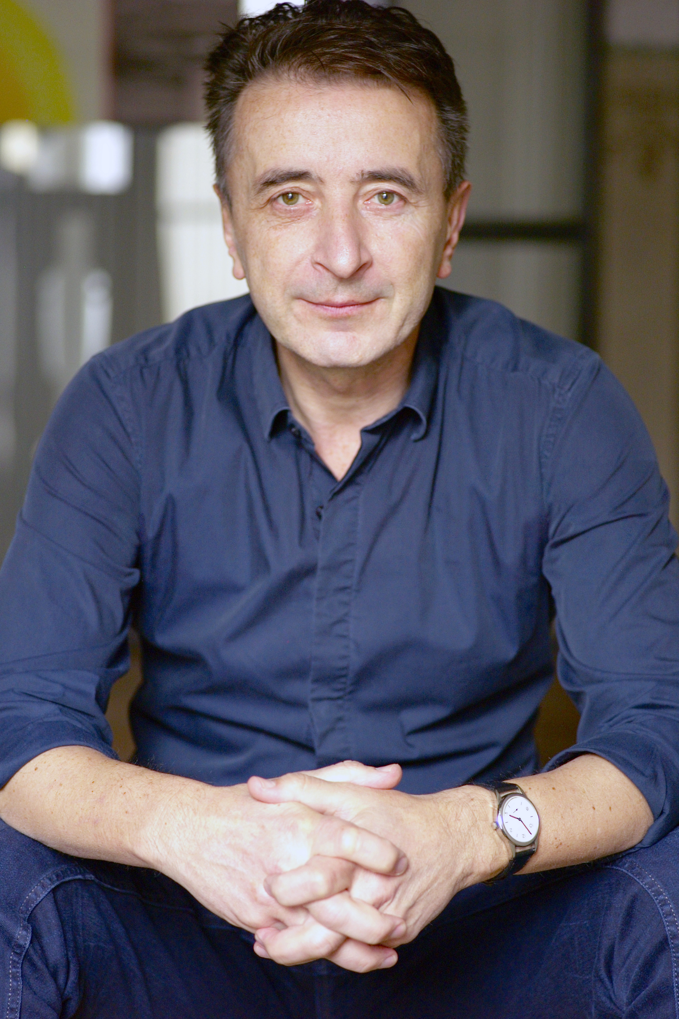 Portrait von Peter Walther, C Steffen Mühle - Fotograf